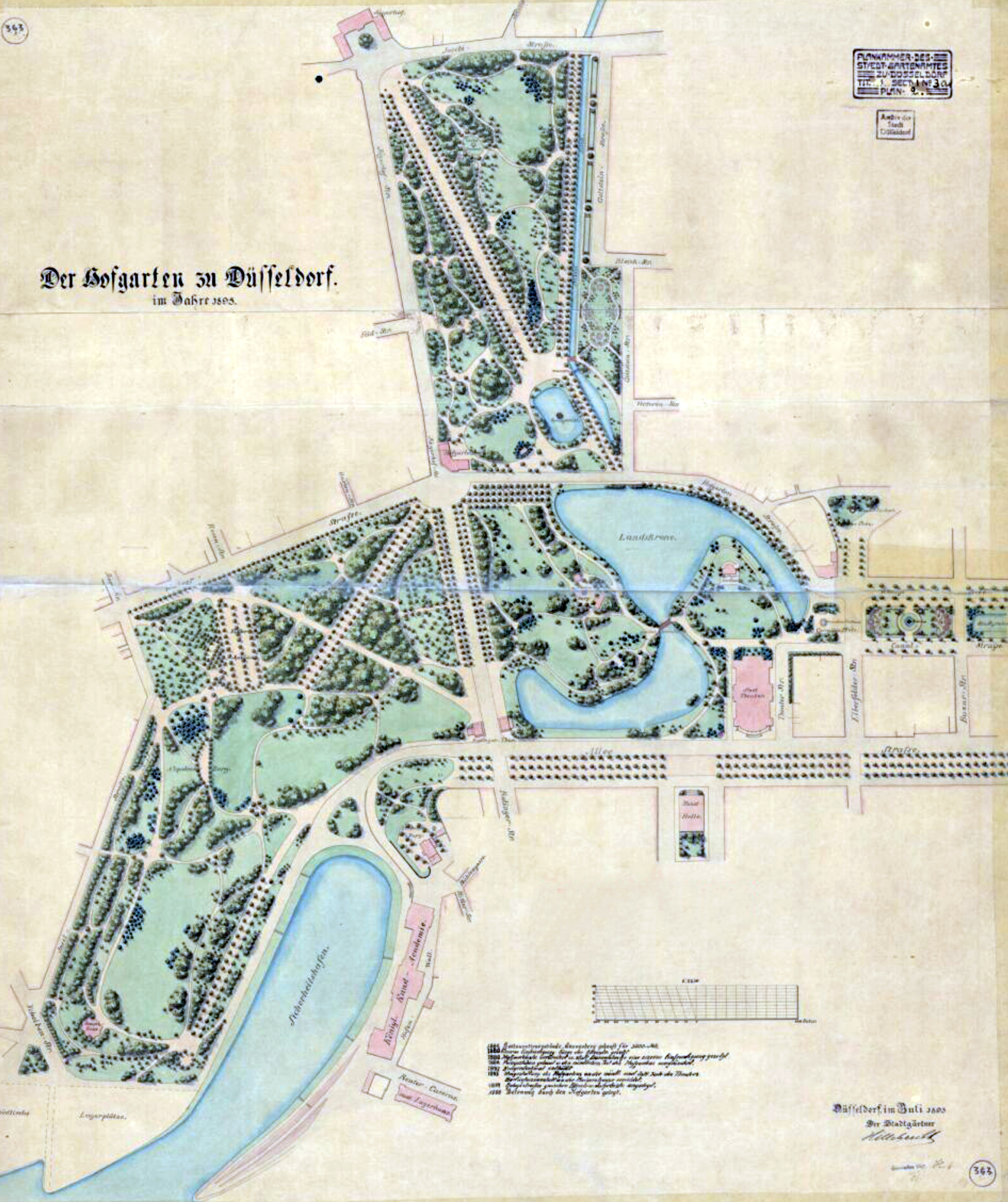 Plan zur gärtnerischen Gestaltung des Hofgartens. Eingezeichnet in Rosa-Rot: Schloss Jägerhof, Hofgärtnerhaus, Ratinger Tor, Stadttheater, Alte Kunsthalle, Eiskellerberg, Kunstakademie am Sicherheitshafen, Lagerhaus Reuterkaserne. 1:1.250